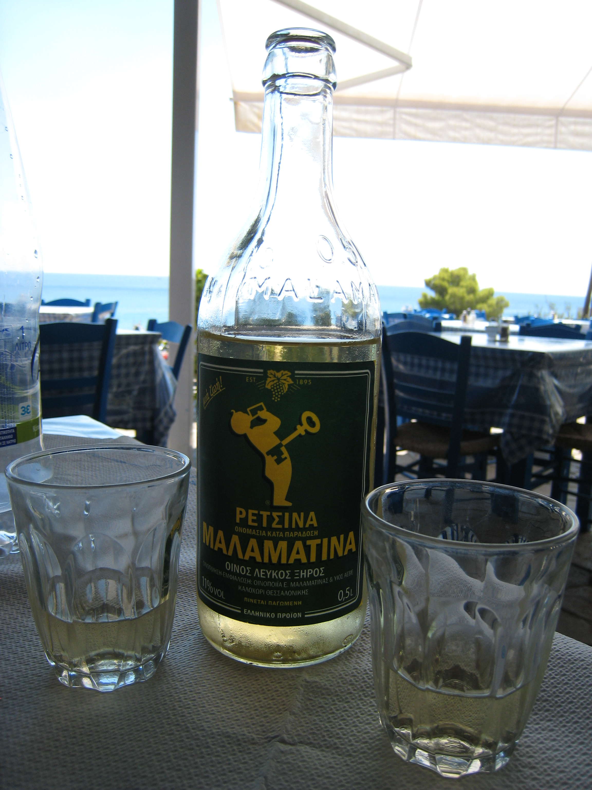 Vin retsina Malamatina